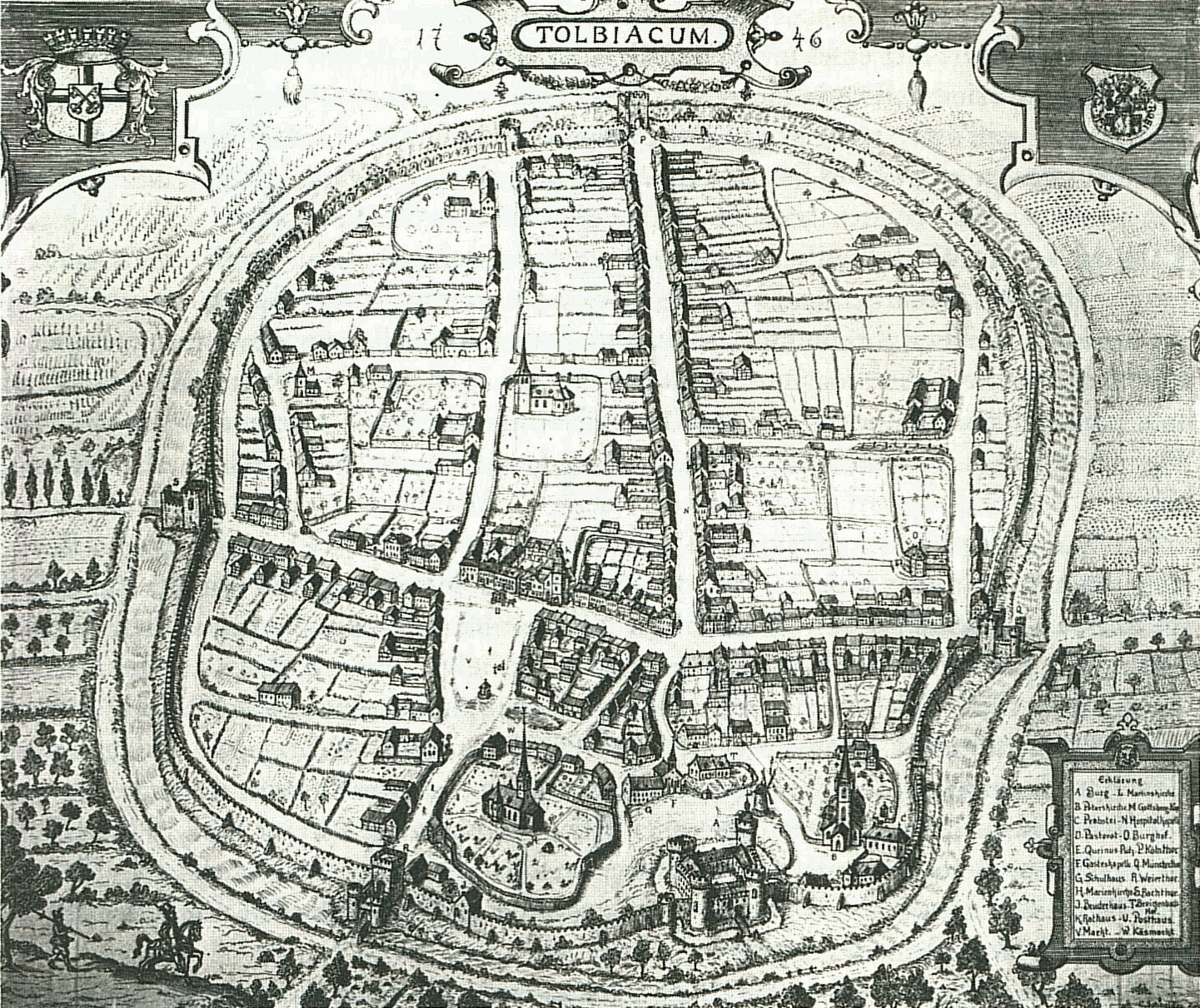 Das mittelalterliche Stadtbild Zülpichs auf einer Zeichnung der Frühen Neuzeit